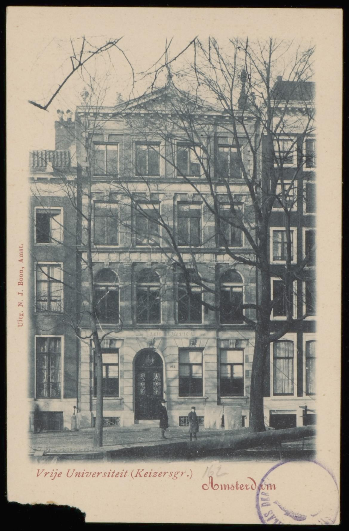 Beschrijving Vrije Universiteit, Keizersgracht 162. Uitgave N.J. Boon, AmsterdamDocumenttype prentbriefkaartVervaardiger Boon, N.J. (uitgever)Collectie Collectie Stadsarchief Amsterdam: prentbriefkaartenDatering 1900 ca.Geografische naam KeizersgrachtInventarissen PBKD00292000013 Generated with Dememorixer